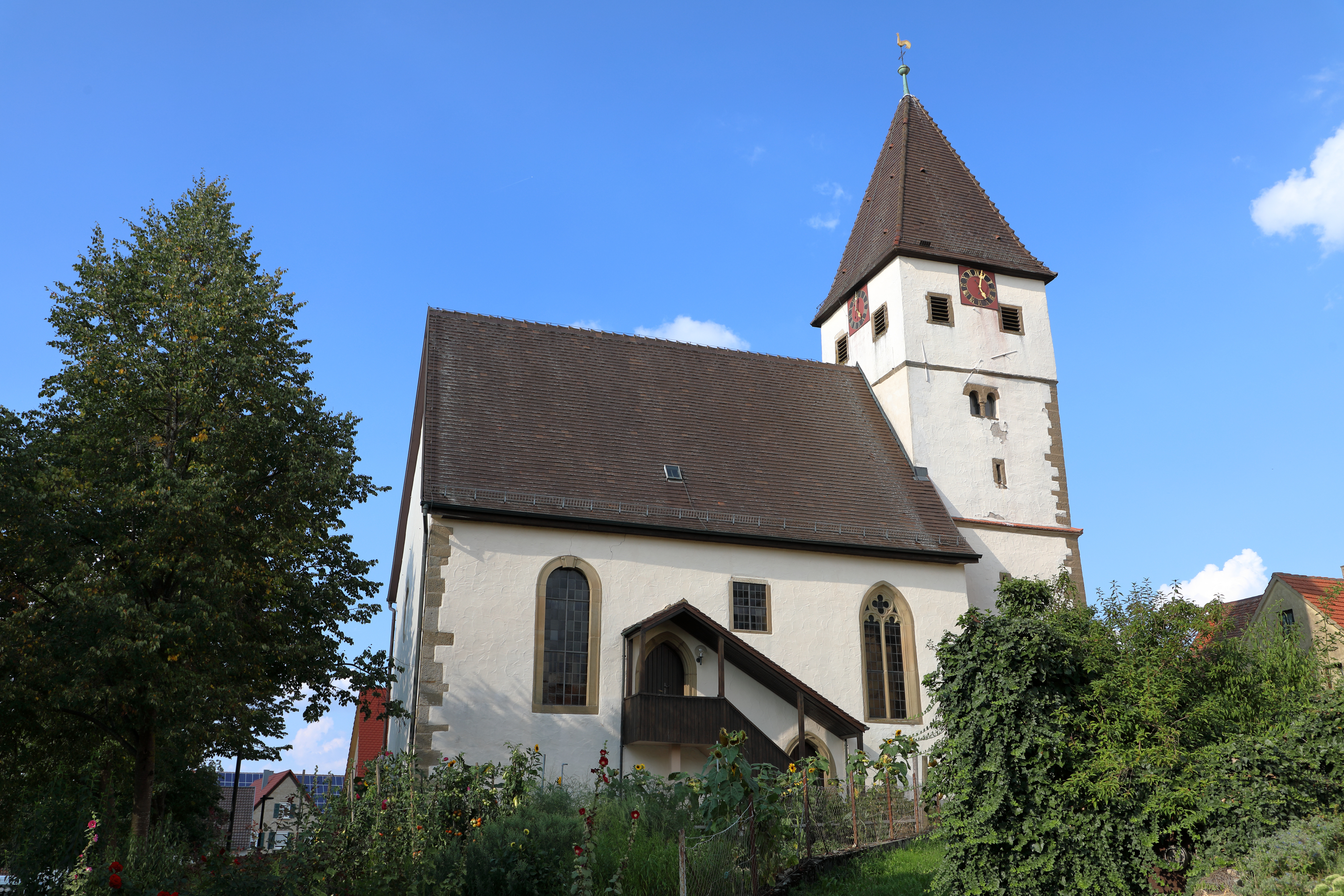 Die denkmalgeschützte Evangelische Pfarrkirche im Niederstettener Ortsteil Adolzhausen.